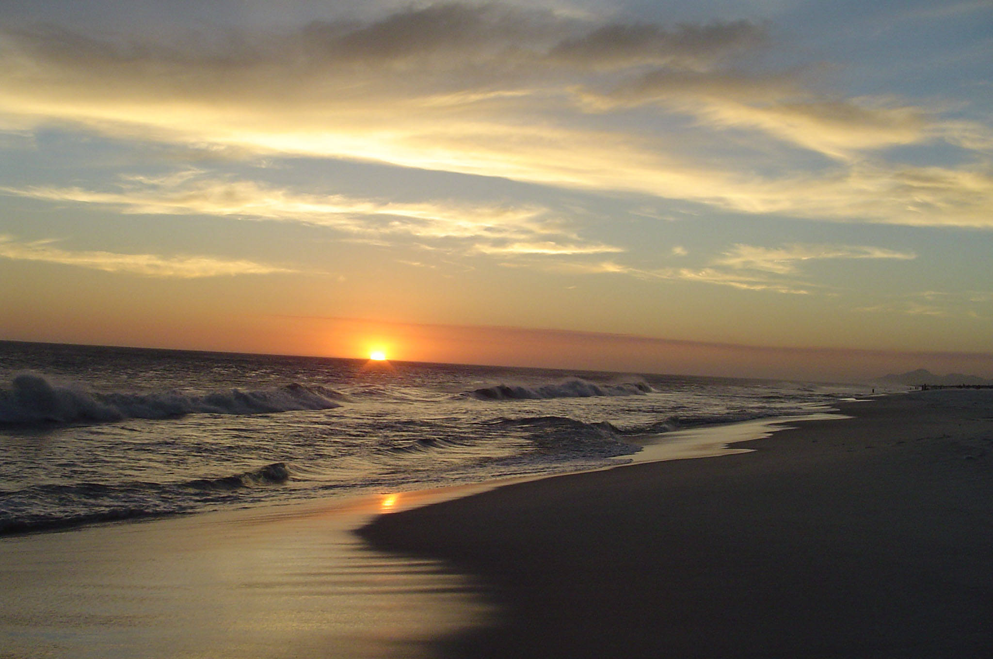 Praia Seca - Araruama-RJ Foto: Gladstone Peixoto Moraes Data: 21/01/2006